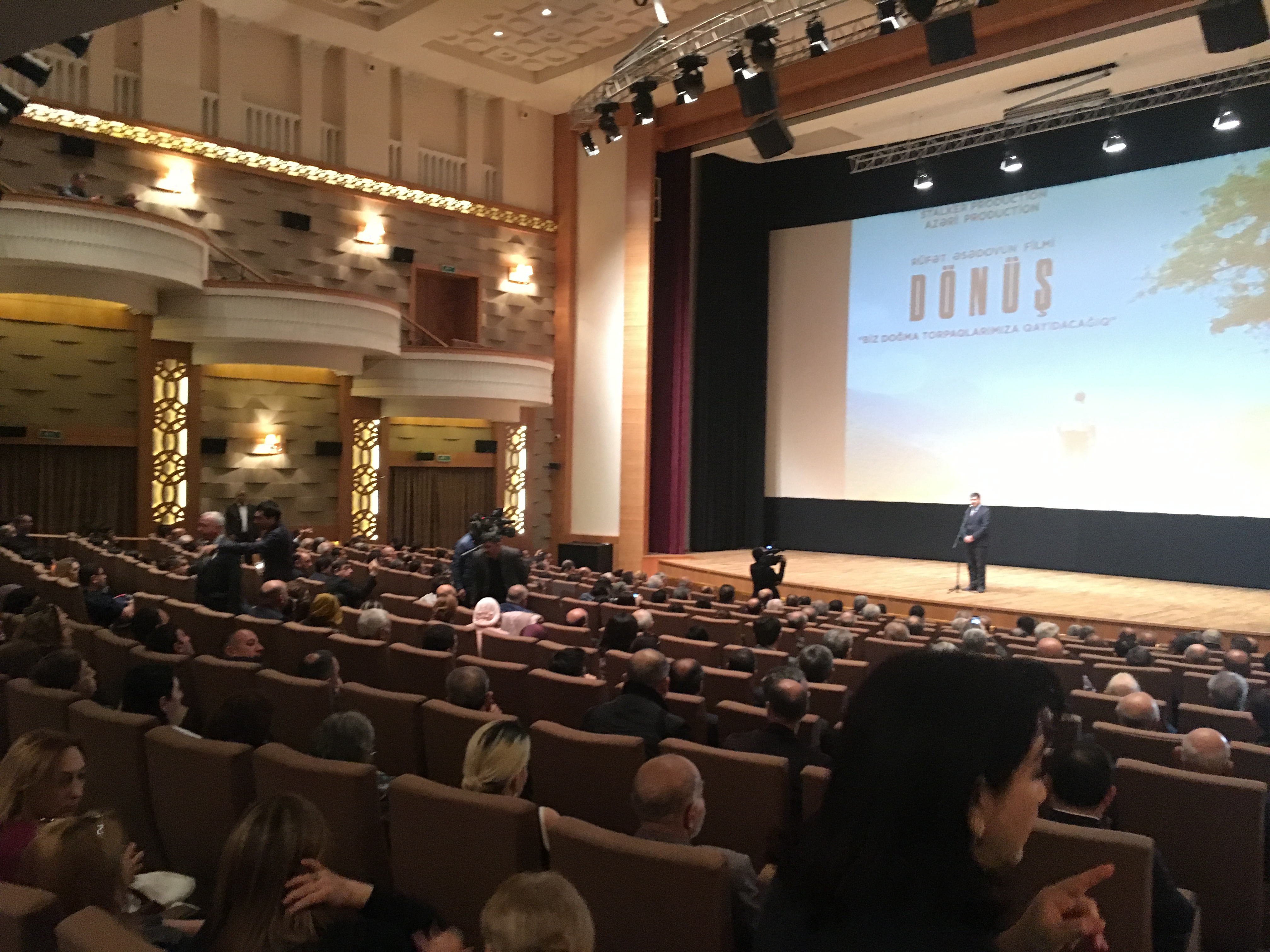 Dönüş (film, 2018)